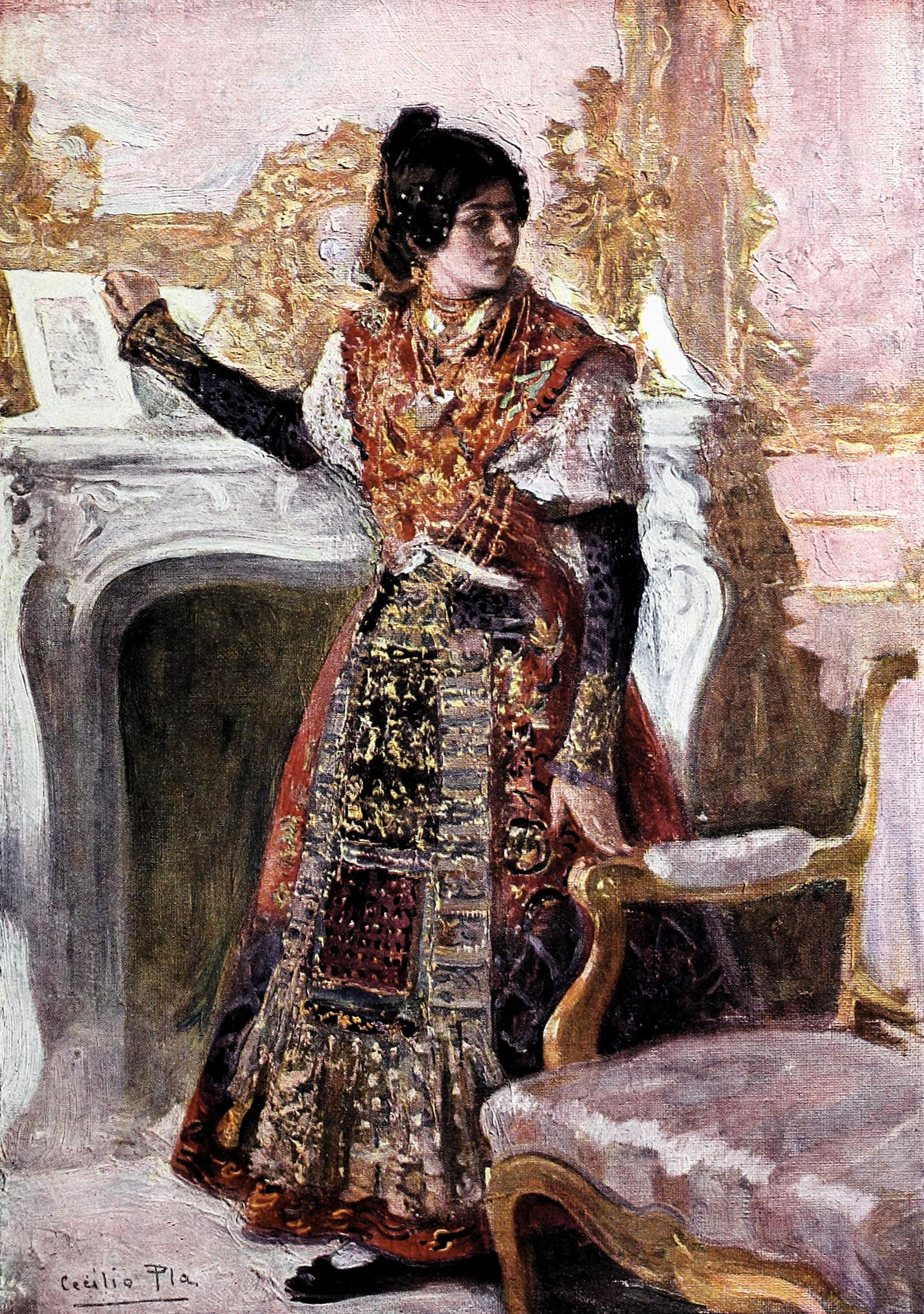 La charra.